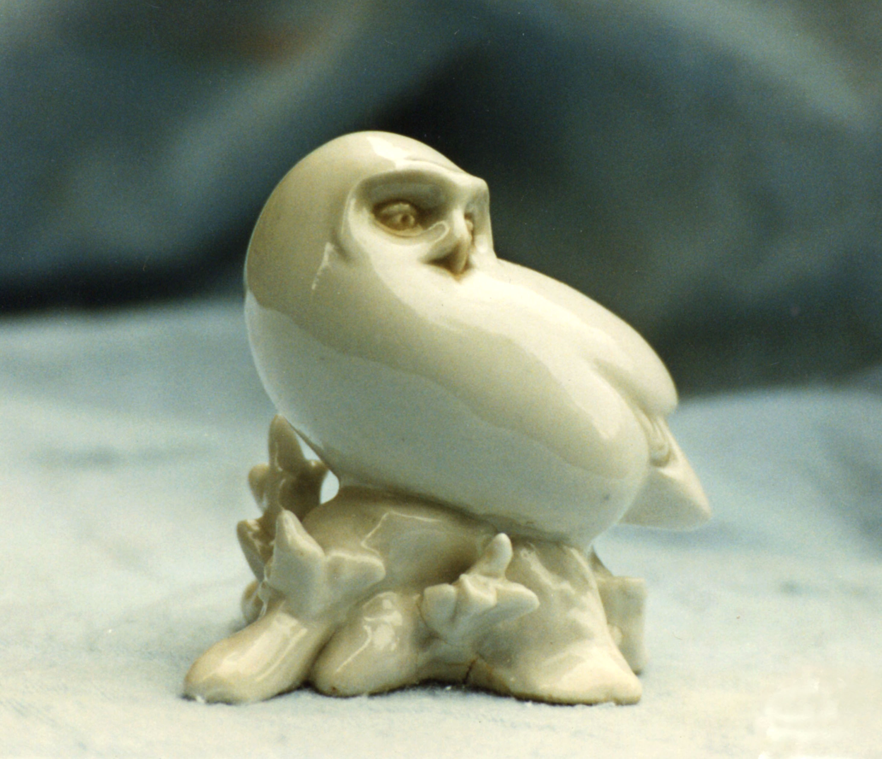 Работа скульптора-художника Николаева Е.В.